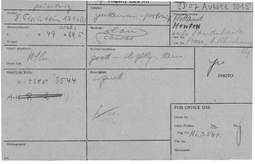 Restitutionsdatei zum Gemälde Portrait eines Offiziers (Künstler: J.F.A. Tischbein) Das Bild war für das Führermuseum Linz bestimmt. Hans Posse kaufte es von Pieter Menten für 3000 Gulden.